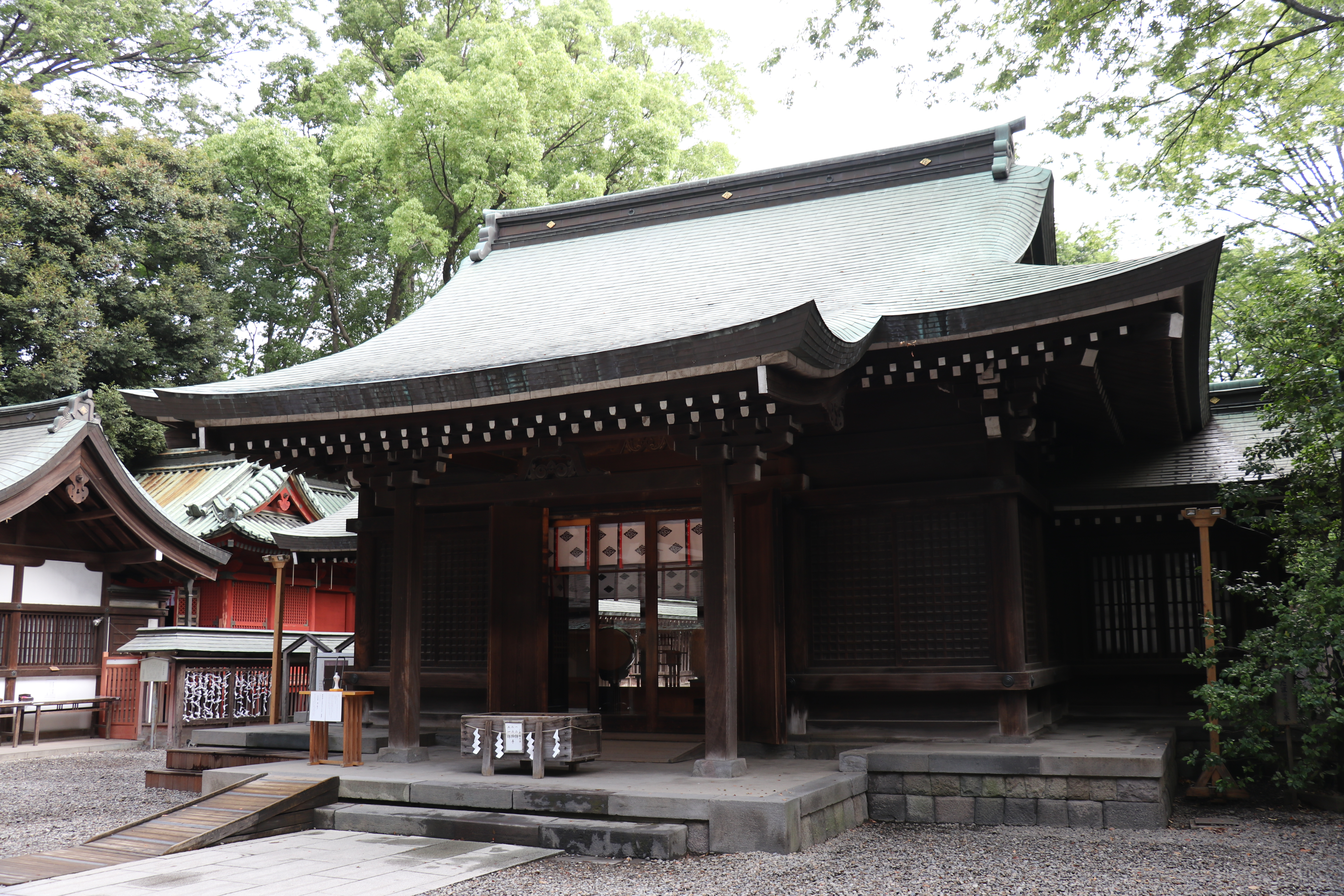 川越冰川神社本殿